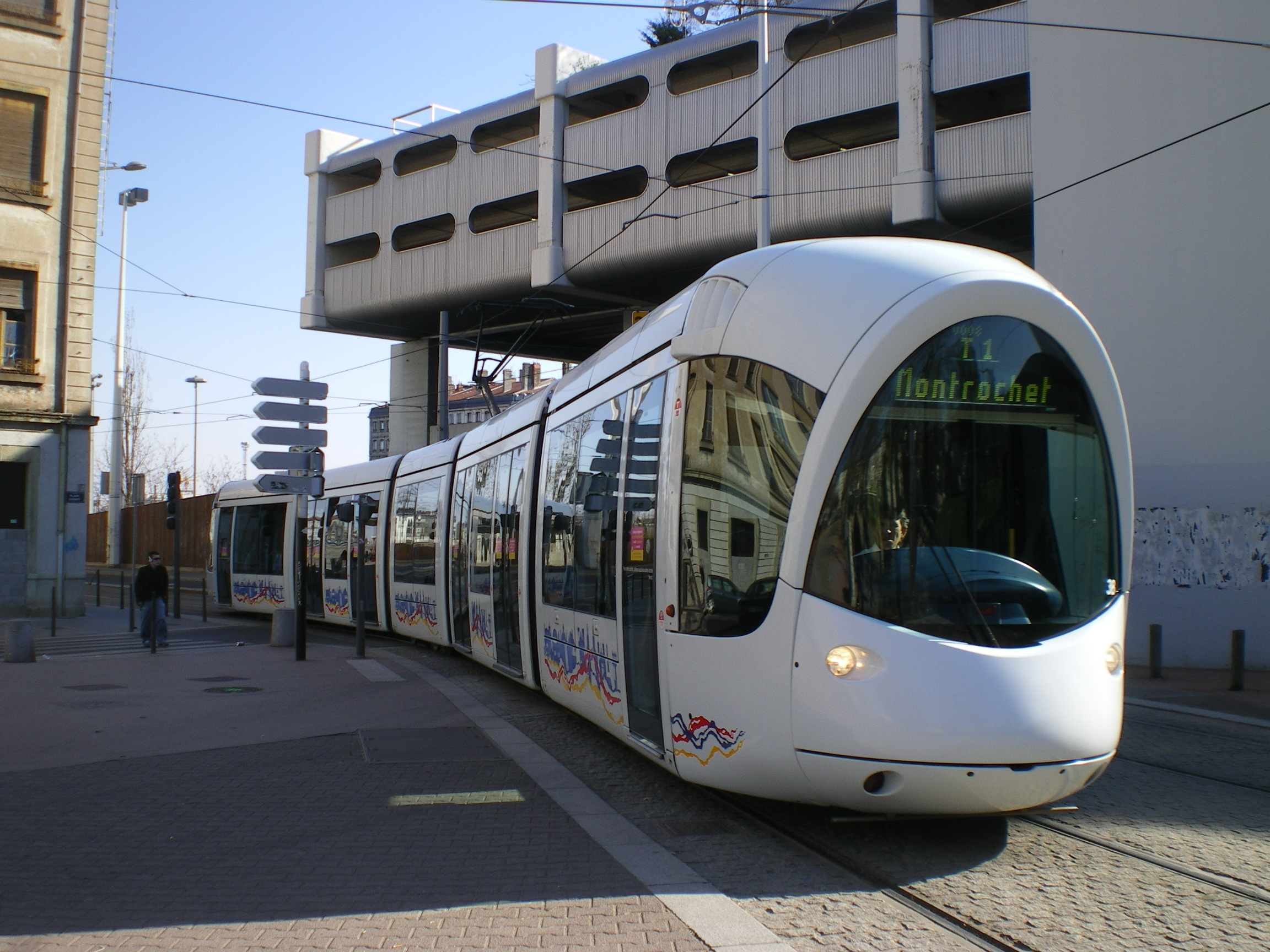 Cette rame de la ligne T1 s'apprête à entrer en Gare Routière de Lyon-Perrache.